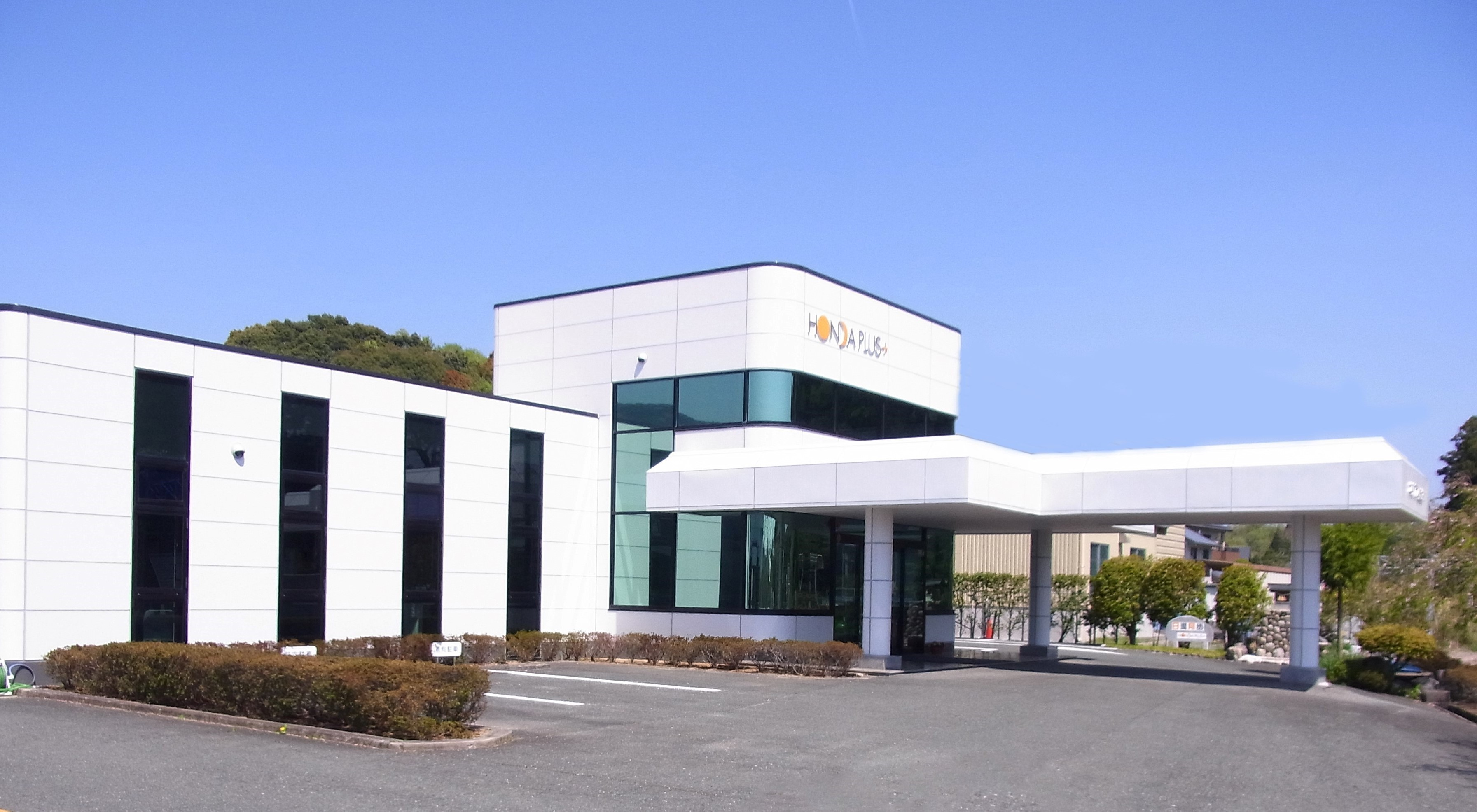 本社(愛知県新城市)